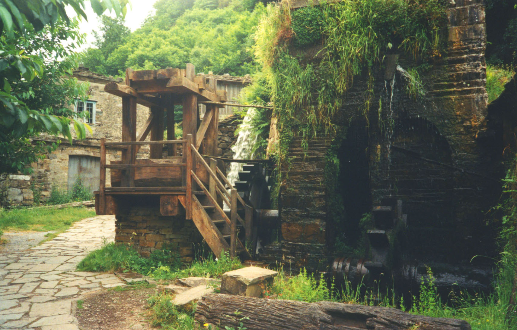 Taramundi (Asturias, España) , conjunto etnográfico de Os Teixois. El batán; fotografía en papel. Taramundi (Asturias, Spain), Os Teixois ethnographic site, El Batán. Paper photograph.